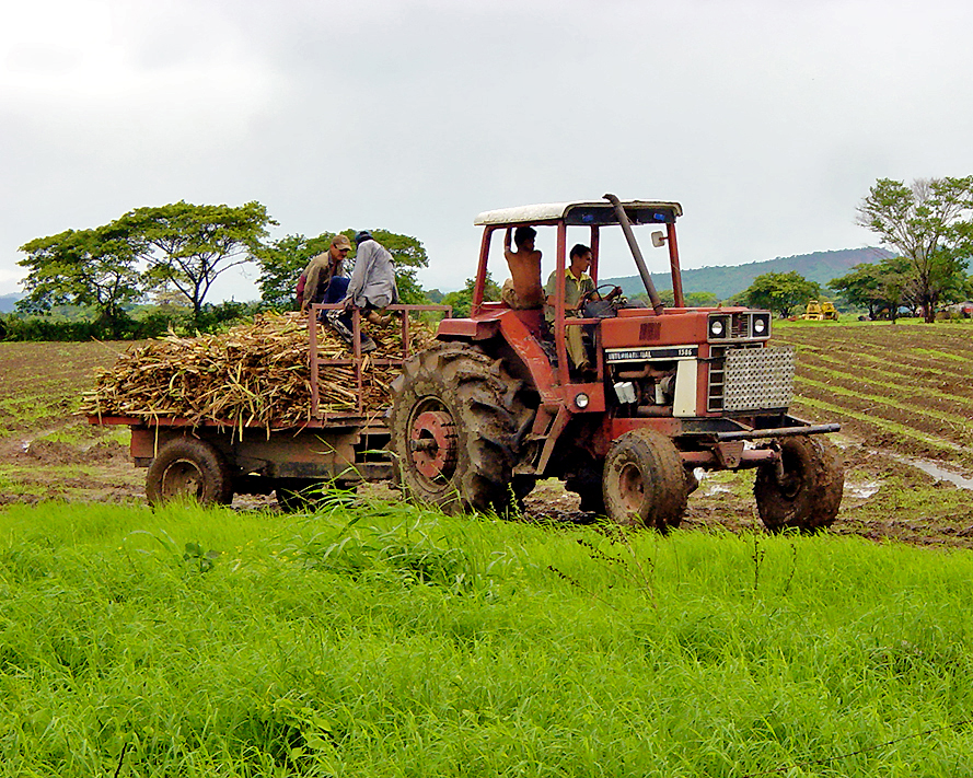 Aprovechando los días lluviosos en el Estado Portuguesa se preparan los campos para la siembra de Caña de Azúcar usando pequeños trozos de siembra anterior que se les conoce como "hijitos". Toda una experiencia conocer todas las etapas que debe realizarse para obtener la cosecha final de este dulce elemento.